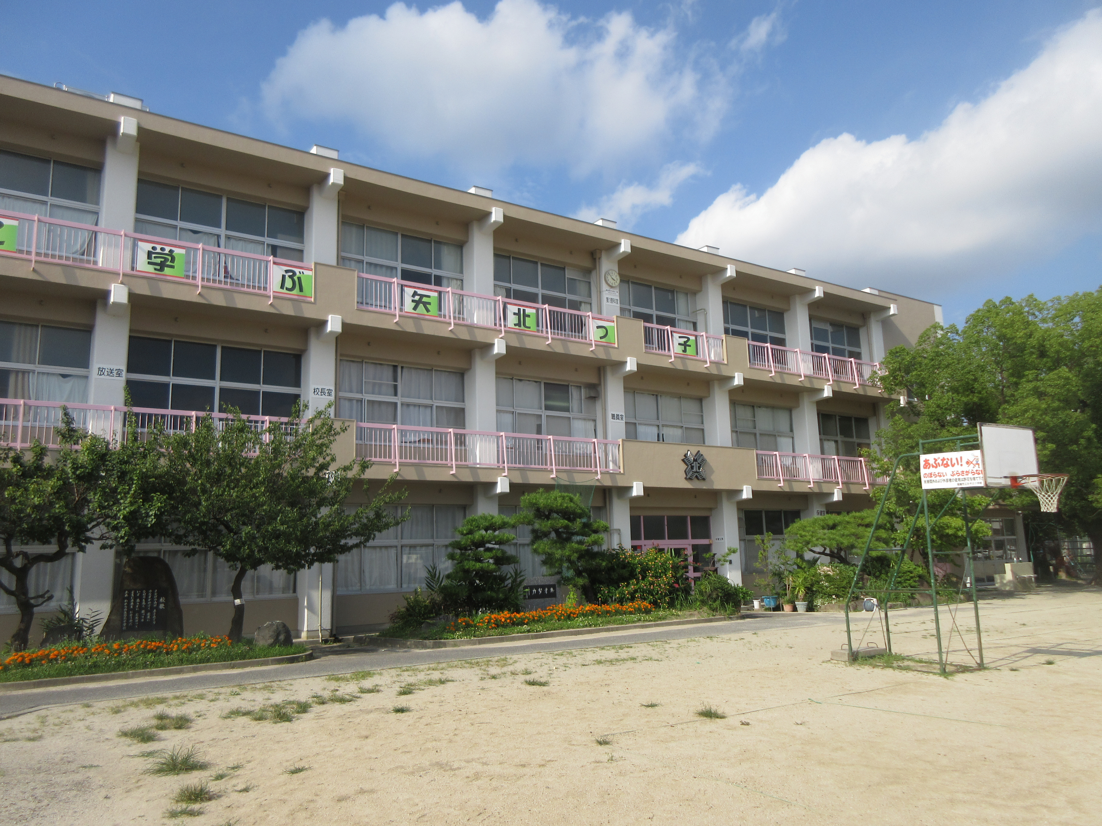 岡崎市立矢作北小学校（岡崎市橋目町）